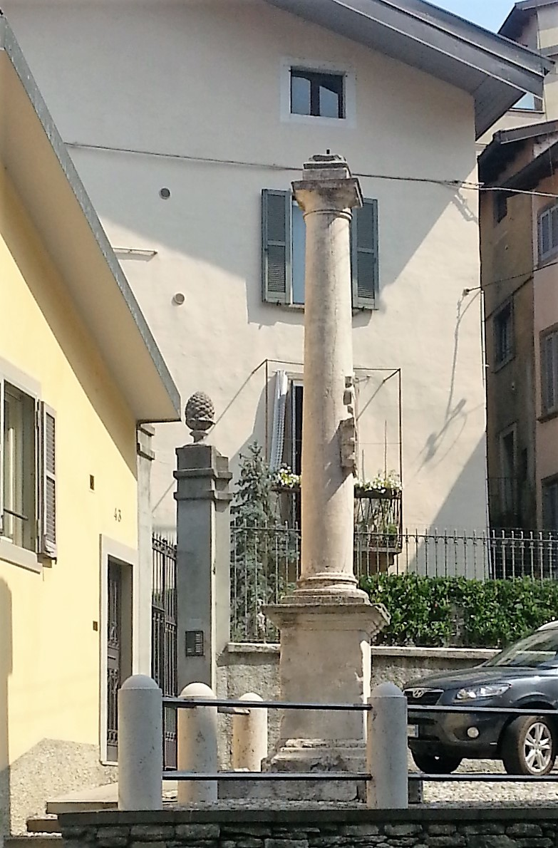 Colonna posta sul luogo dove c'era la chiesa di Sant'Alessandro alla colonna prima di essere distrutta nel 561